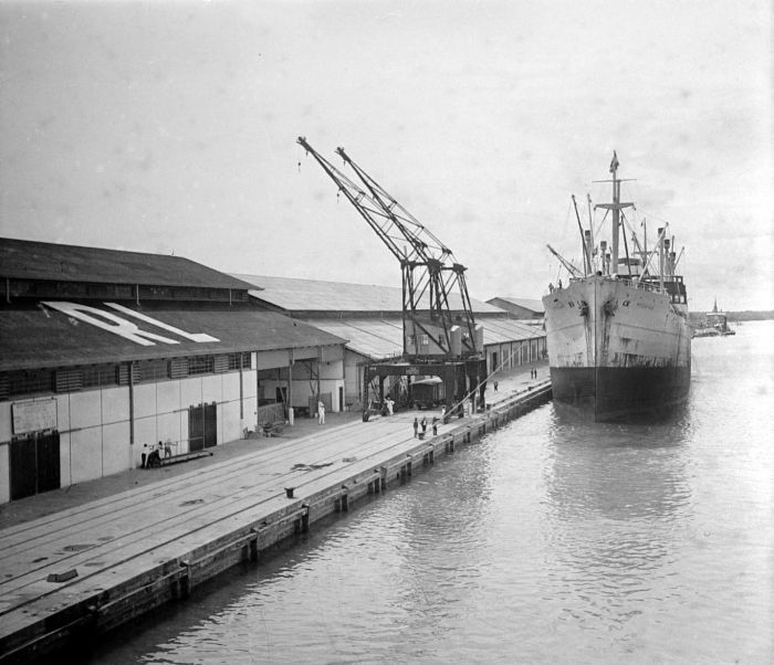 Repronegatief. Deens schip in de haven van Belawan, Sumatra